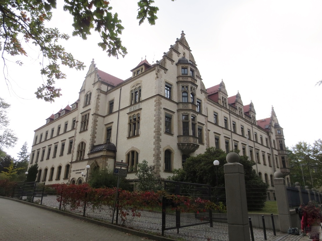 Kulturdenkmal Chemnitz Kaßberg.